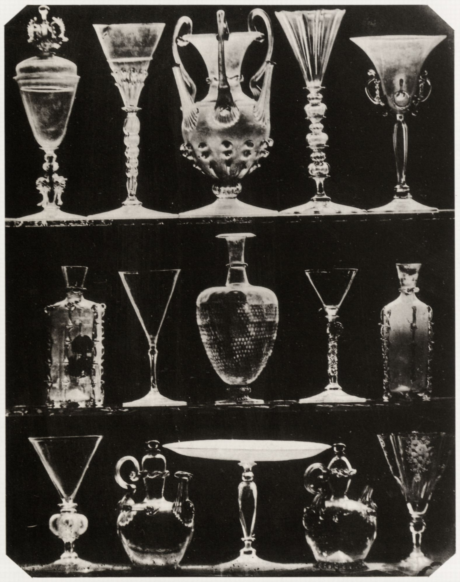 Belitski, Ludwig: 14 Venezianische und deutsche Gläser und eine orientalische Glas-Vase aus Milch- und Opalglas, mit eingebrannter Vergoldung und Malerei. 2-5 Naturgröße. 16., 17. und 18. Jahrhundert, Liegnitz